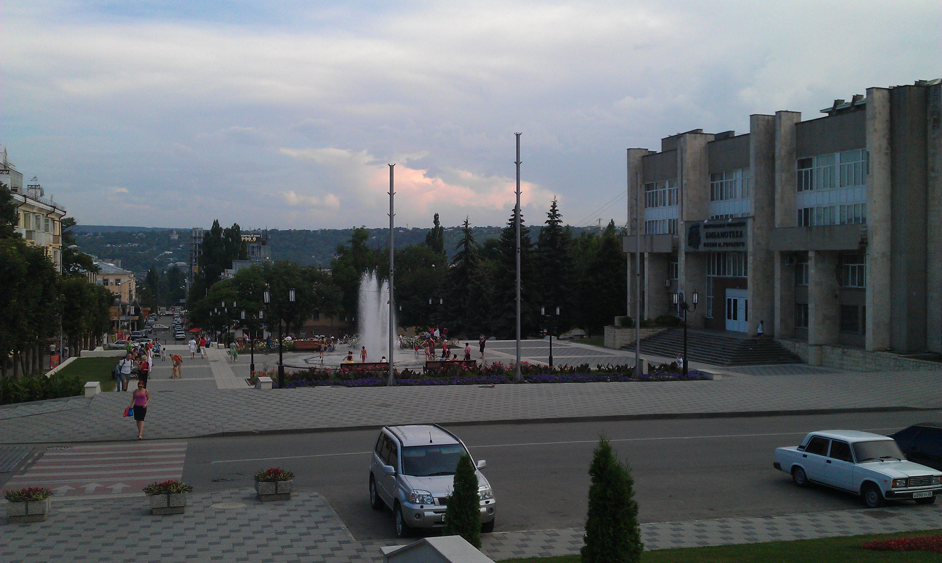 Вид со стороны администрации города